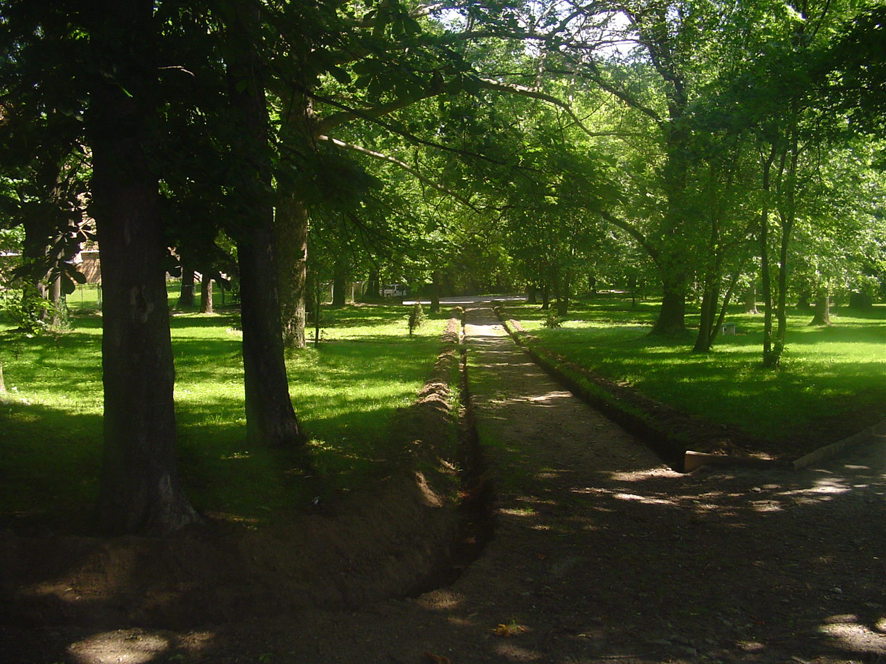 Zdjęcie parku miejskiego w mieście Piława Górna.